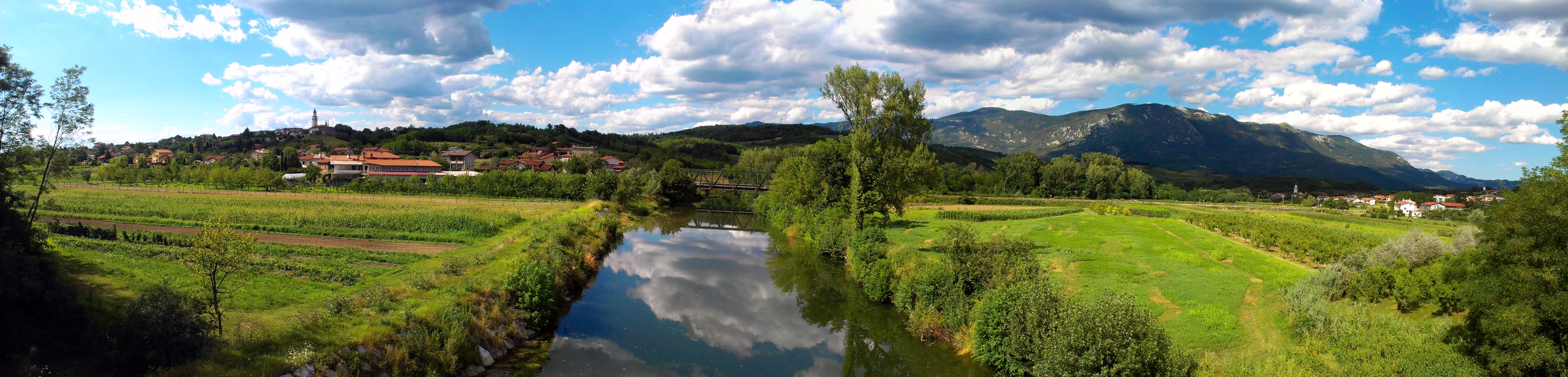 River Vipava